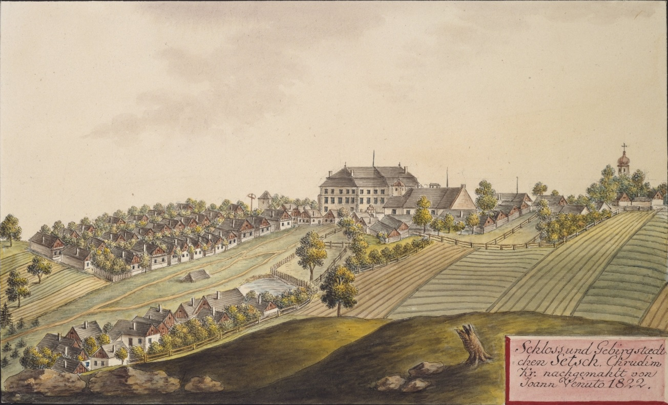 Seč. Schloss und Gebirgstaedtchen Setsch, Chrudim Kr. nachgemahlt von Joann Venuto 1822